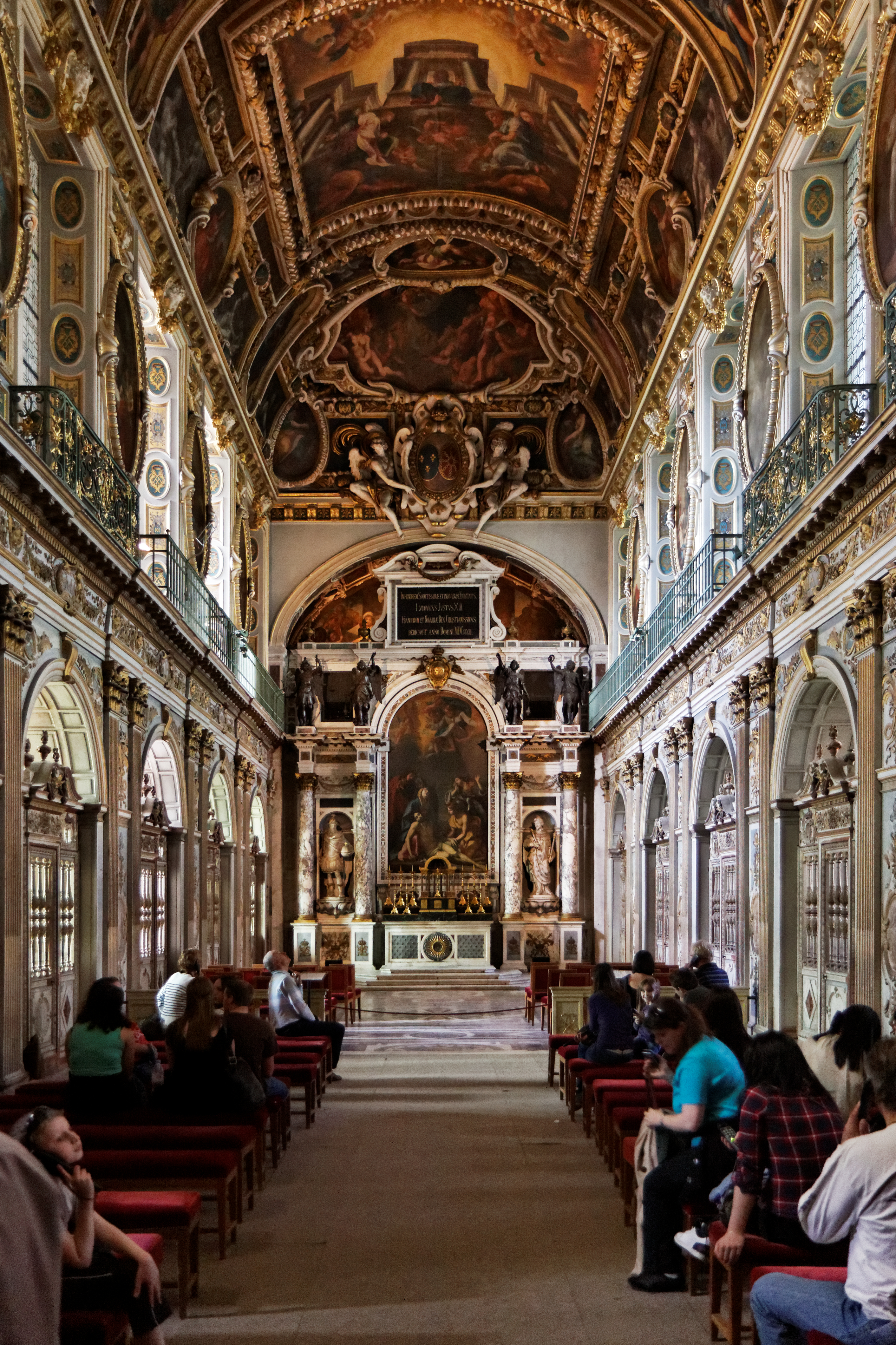 Vue de l'intérieur du château de Fontainebleau.